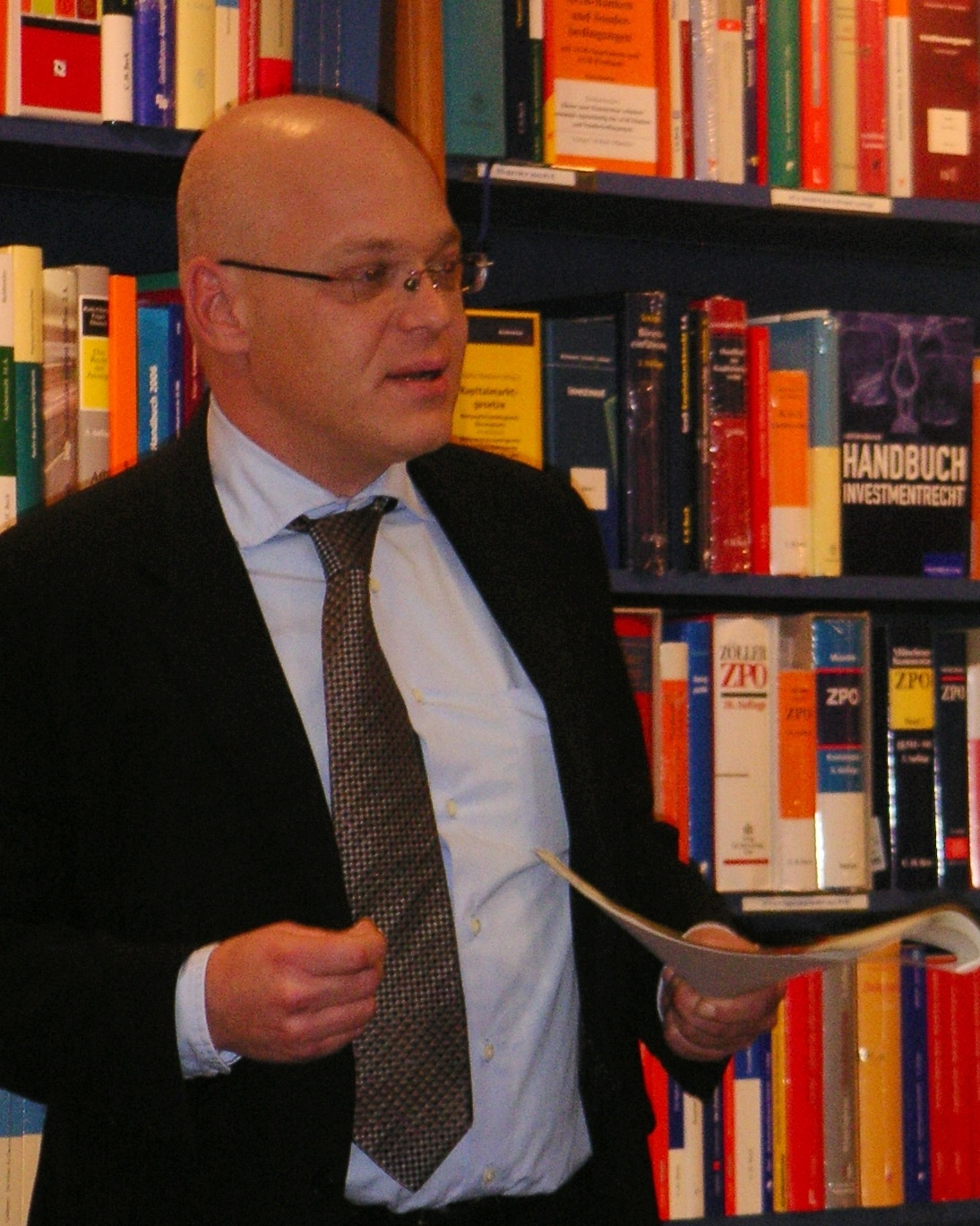 Mark Zeuner während eines Vortrages in Hamburg